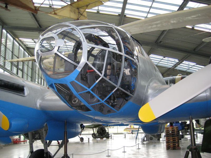 CASA 2.111B Cockpit Flugwerft Schleissheim